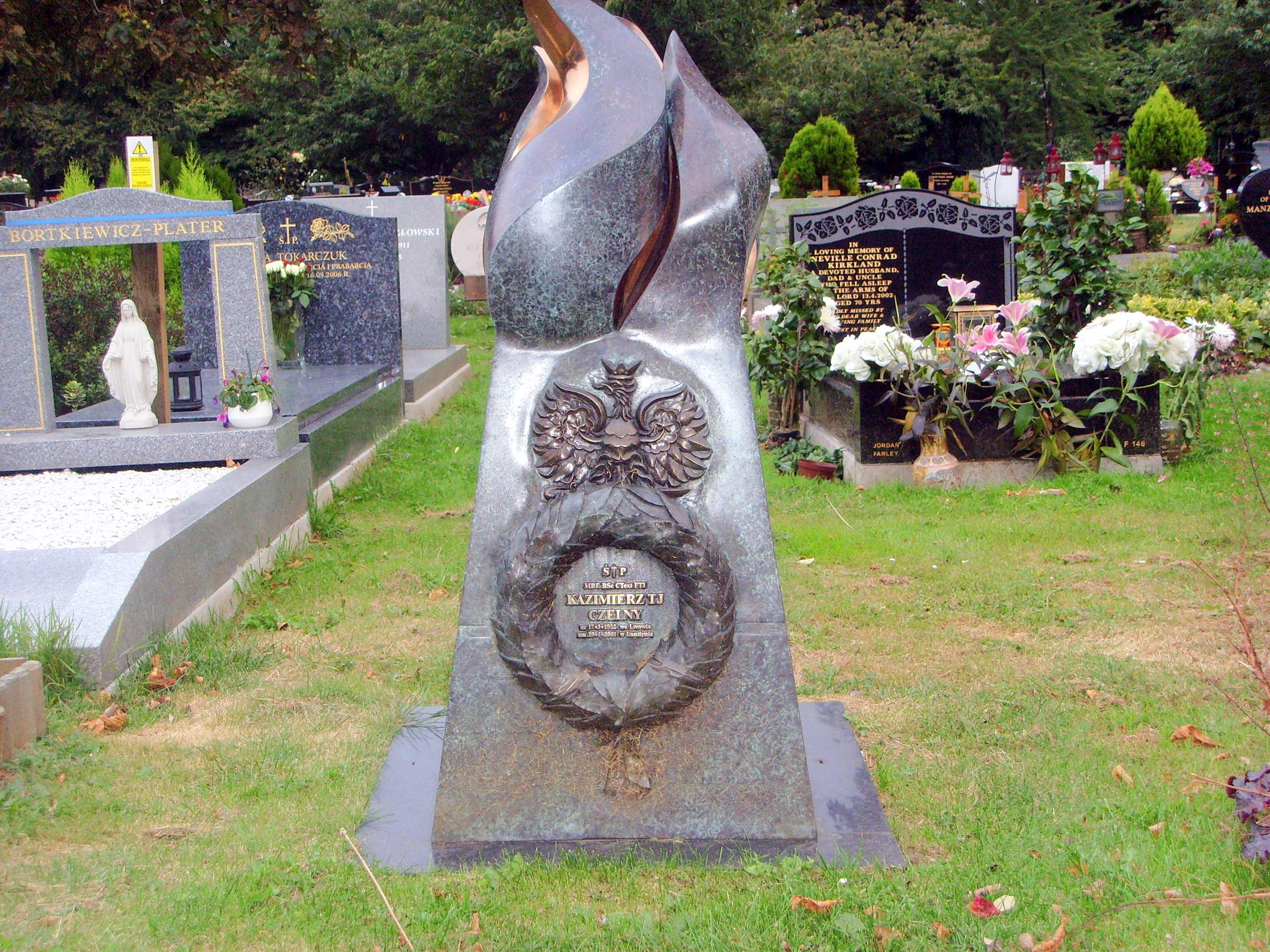 Grób inż. Kazimierza Czelnego